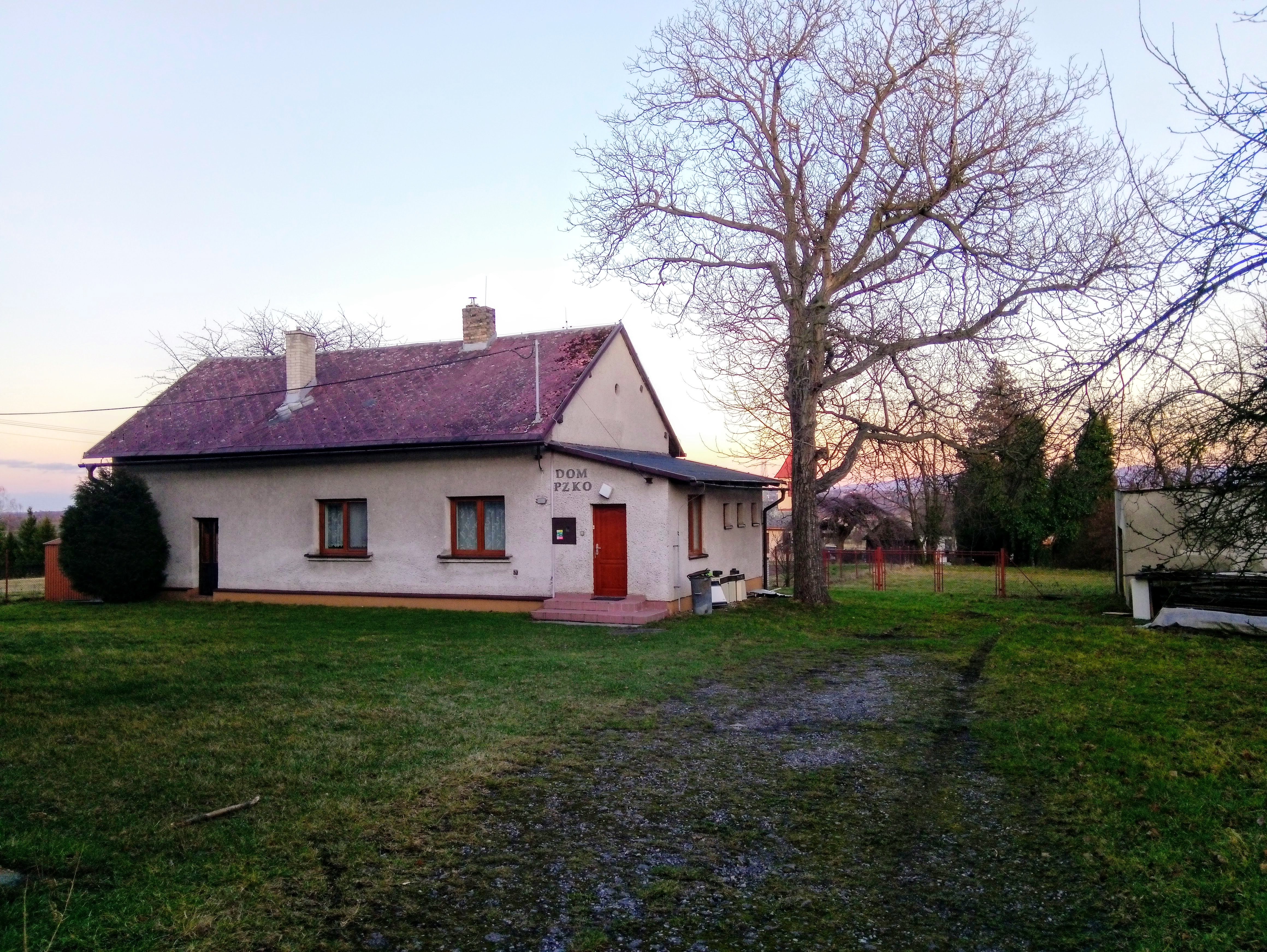 Dom PZKO w Kocobędzu. 49.765894, 18.577668 Chotěbuzská, 735 61 Chotěbuz